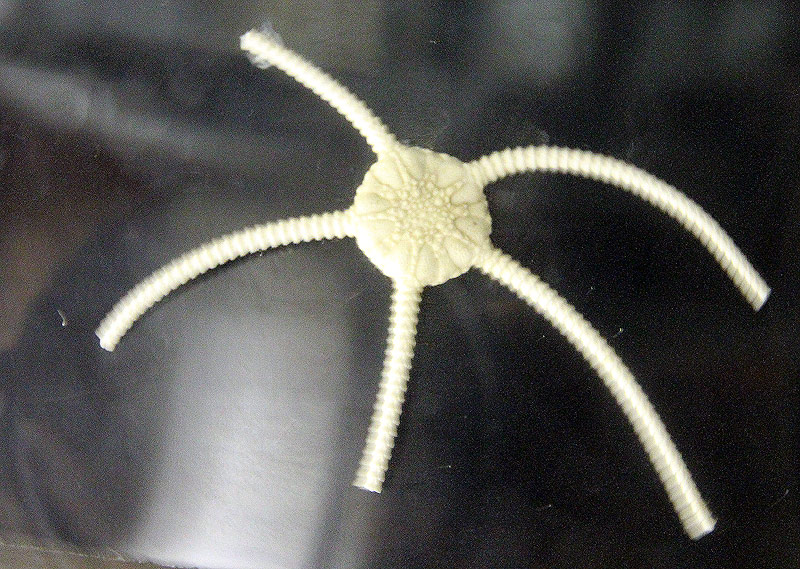 Ophiomusium lymani, экспонат в музее